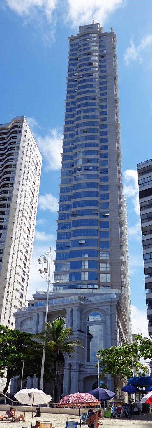 vista frontal do Millennium palace